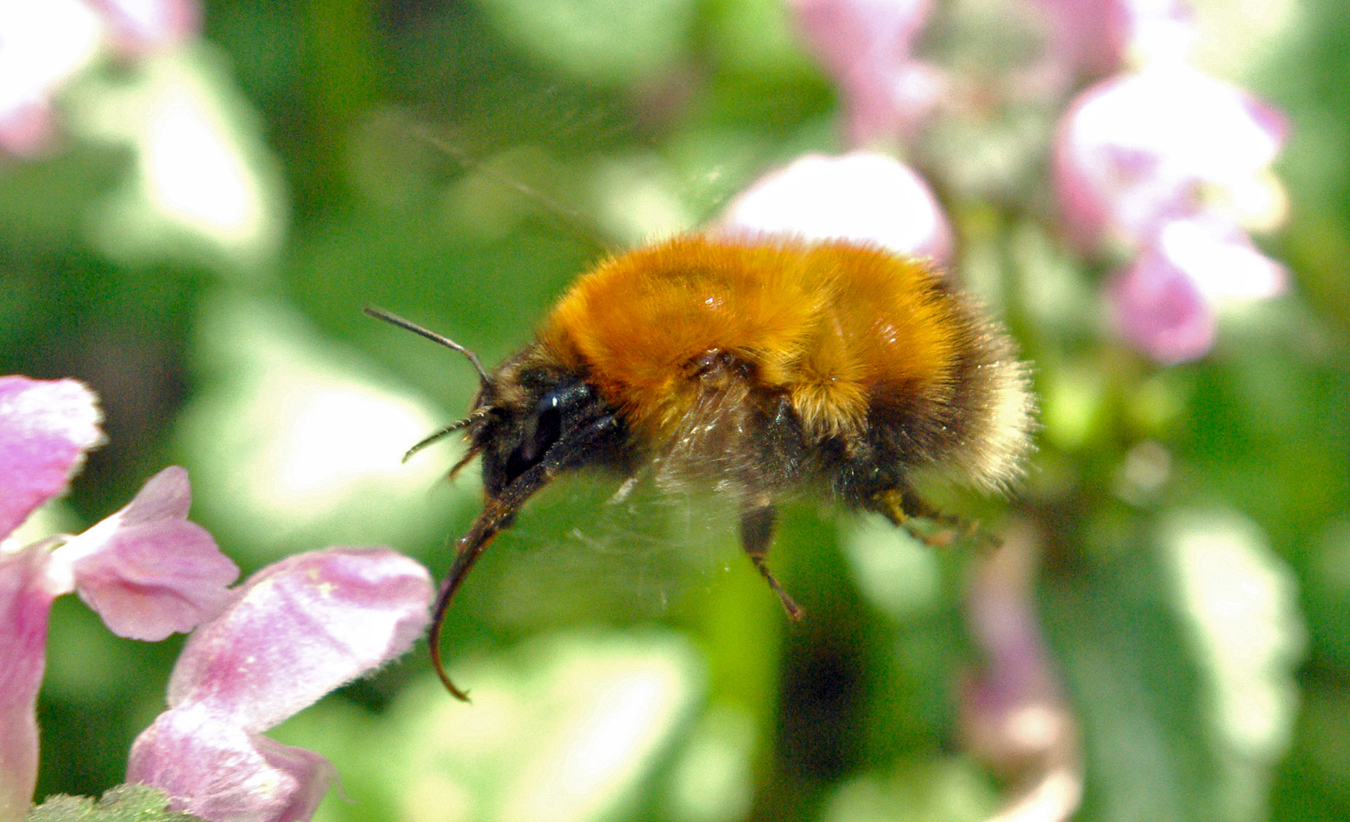 Bildet er tatt av fursajerende lushatthumle på lamium i Søndre Land.